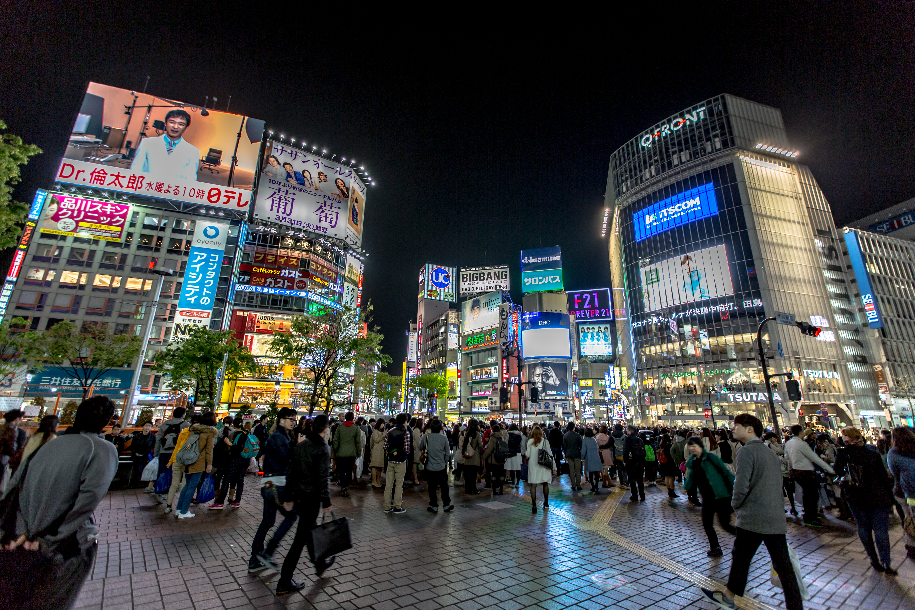 サザンオールスターズ 葡萄